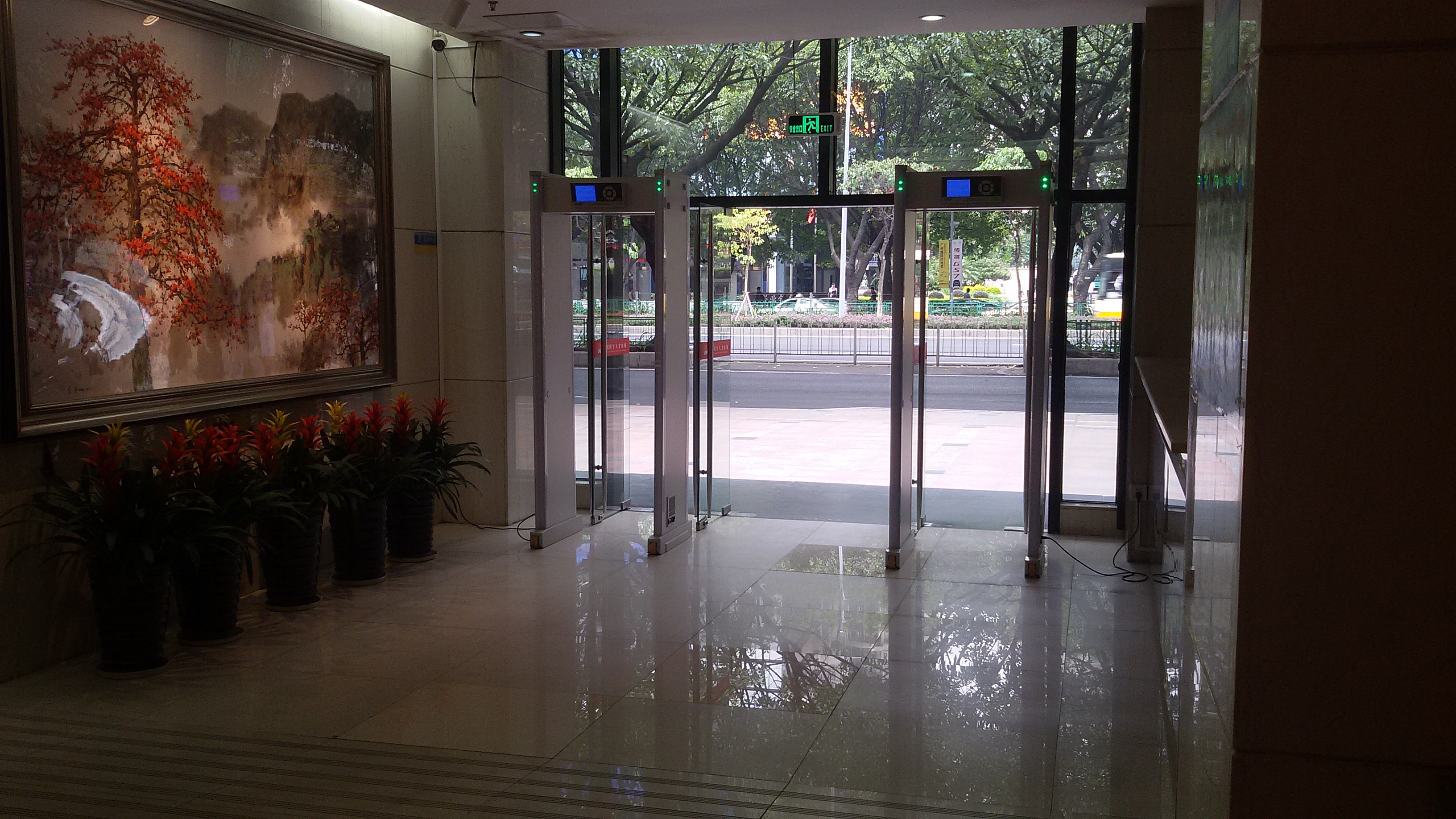 粵語: 喺写字楼下嘅安检门